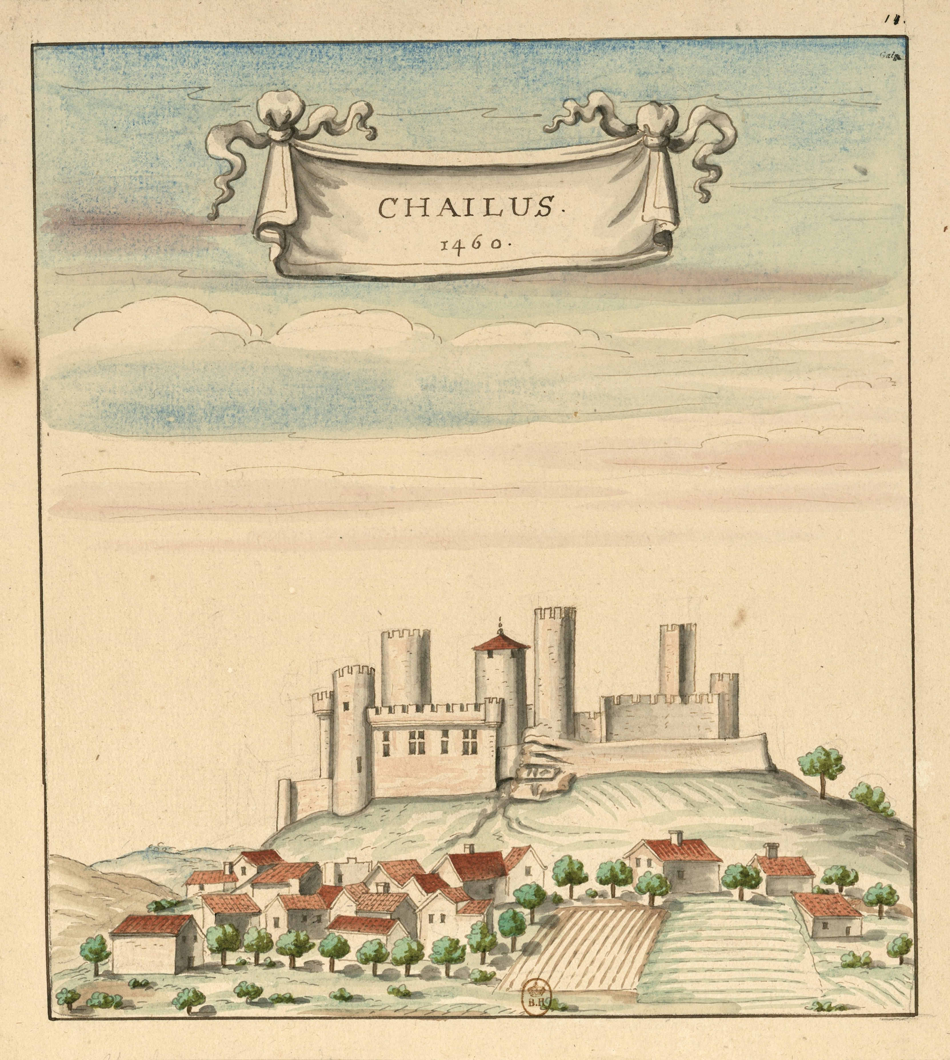 Château de Châlus en 1460.